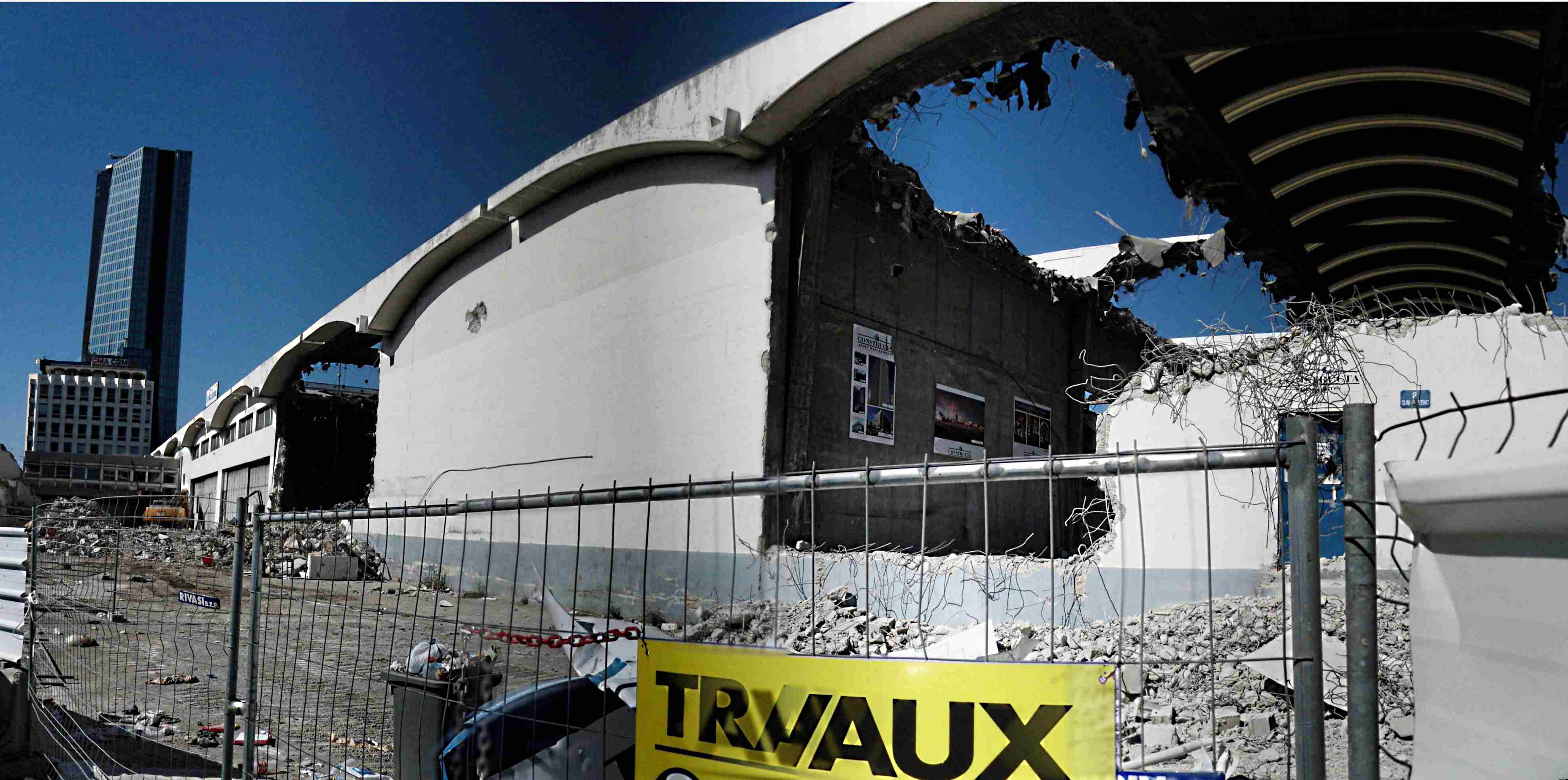 Démolition du hangar Transcausse avant les travaux du programme Quai d'Arenc du promoteur immobilier Constructa en aout 2010.